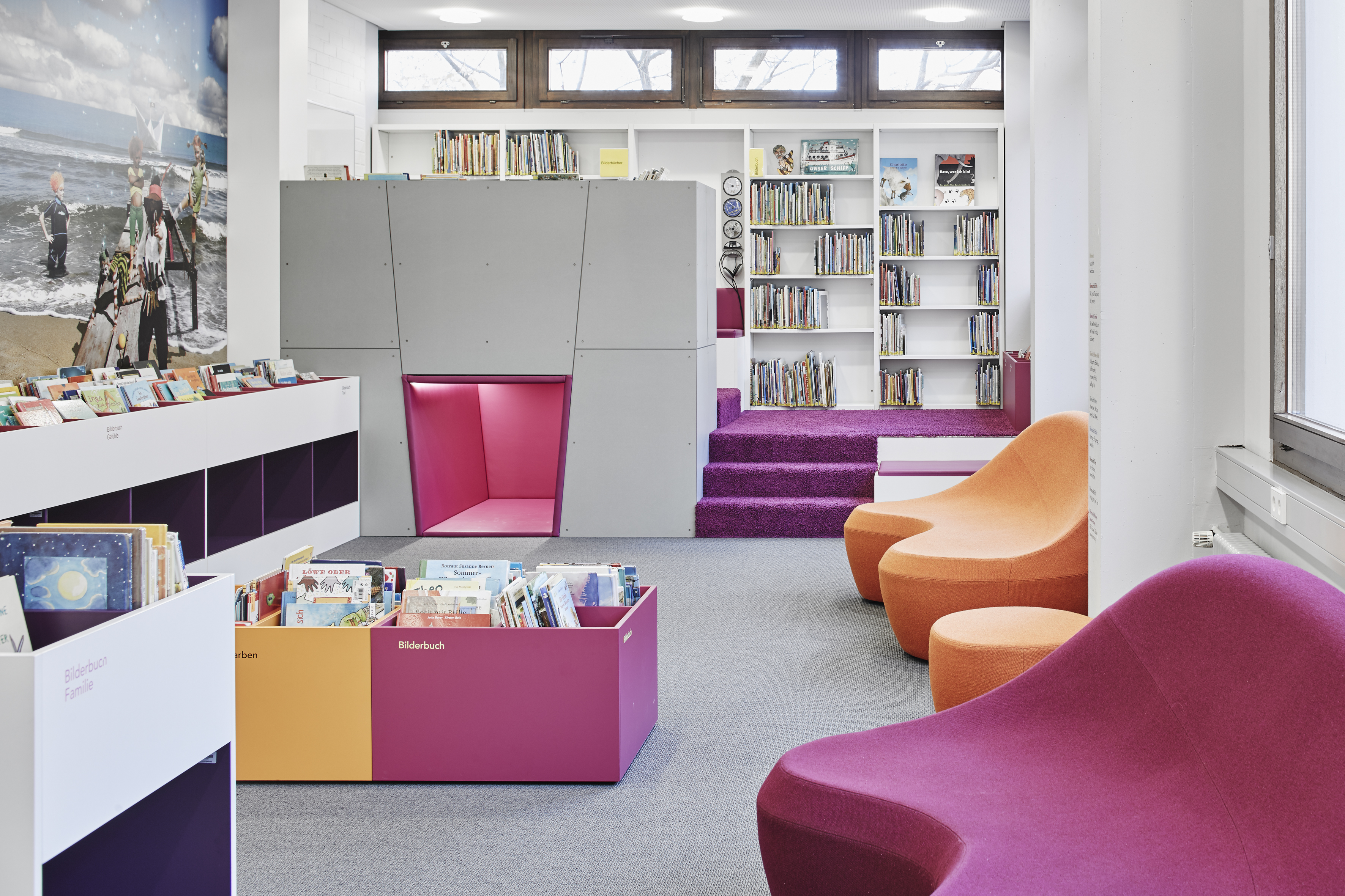 Bilderbuchbereich der Kinderbibliothek Ludwigsburg.